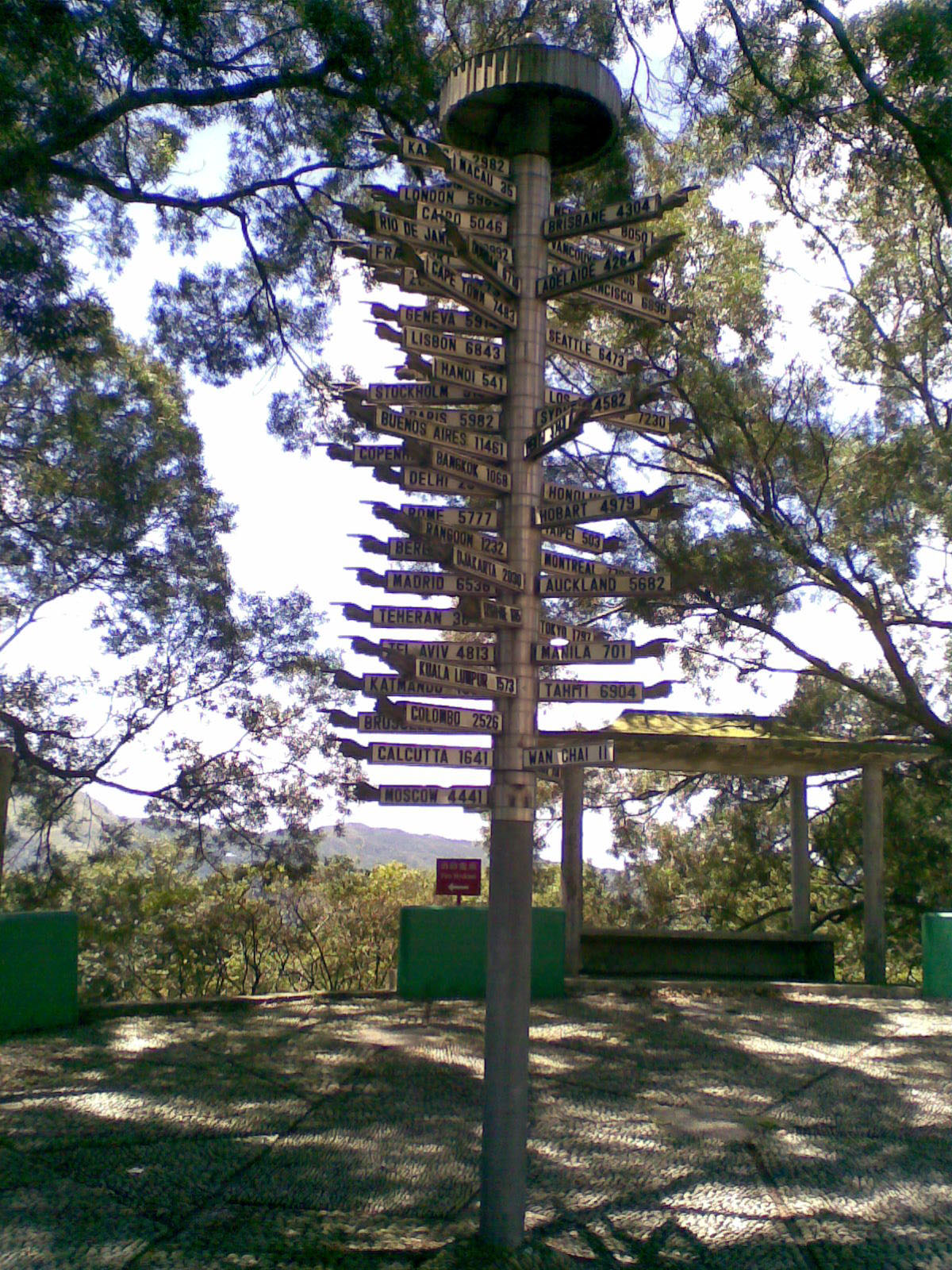 中文（香港）: 嘉道理農場暨植物園世界主要城市指示牌